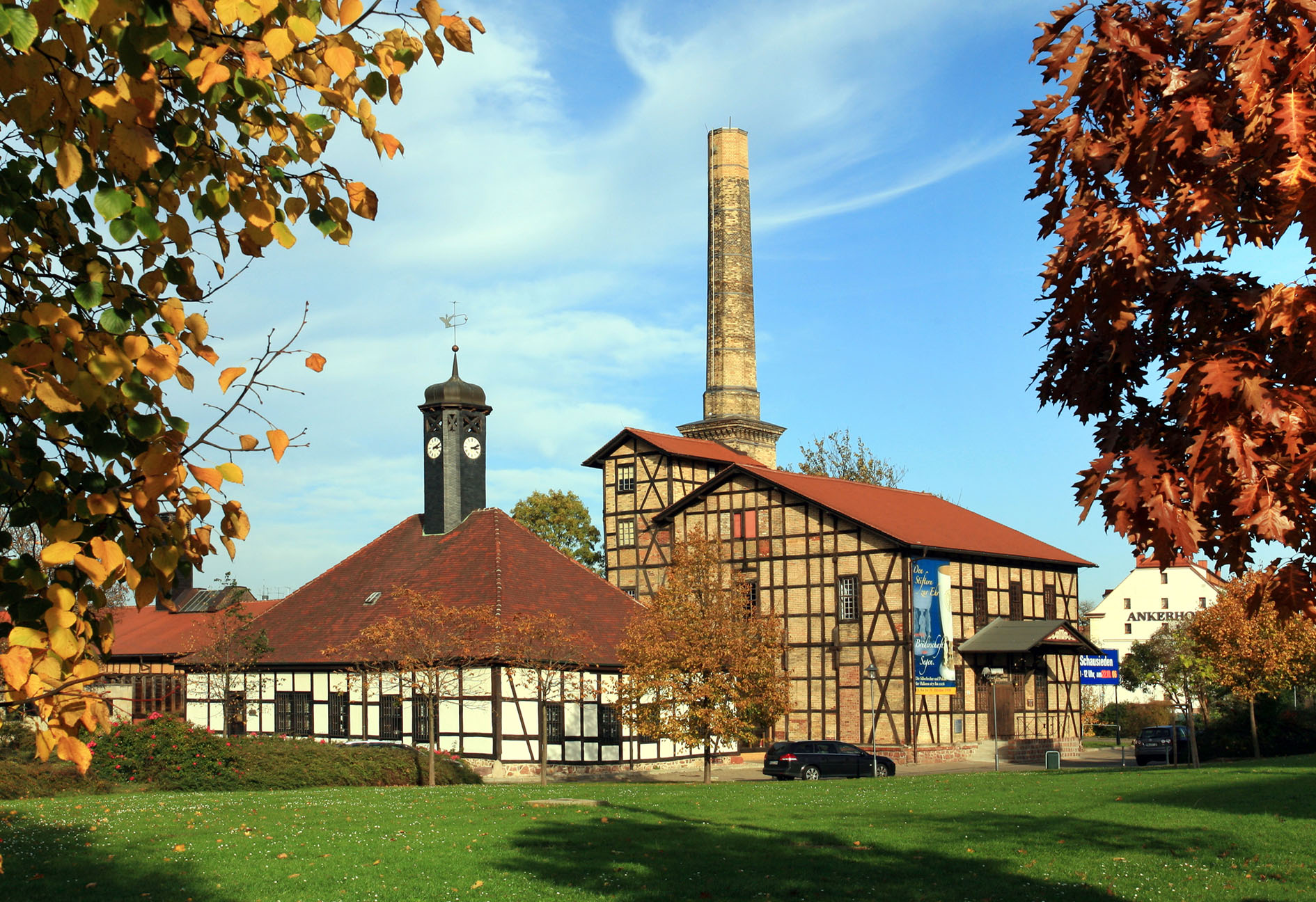 Das Saline Museum in Halle (Saale)